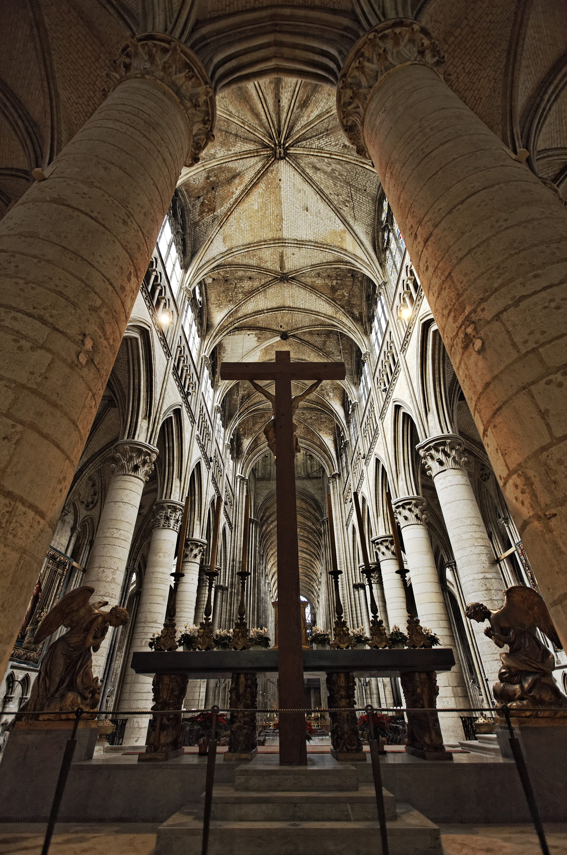 Cathédrale de Rouen. Choeur. .